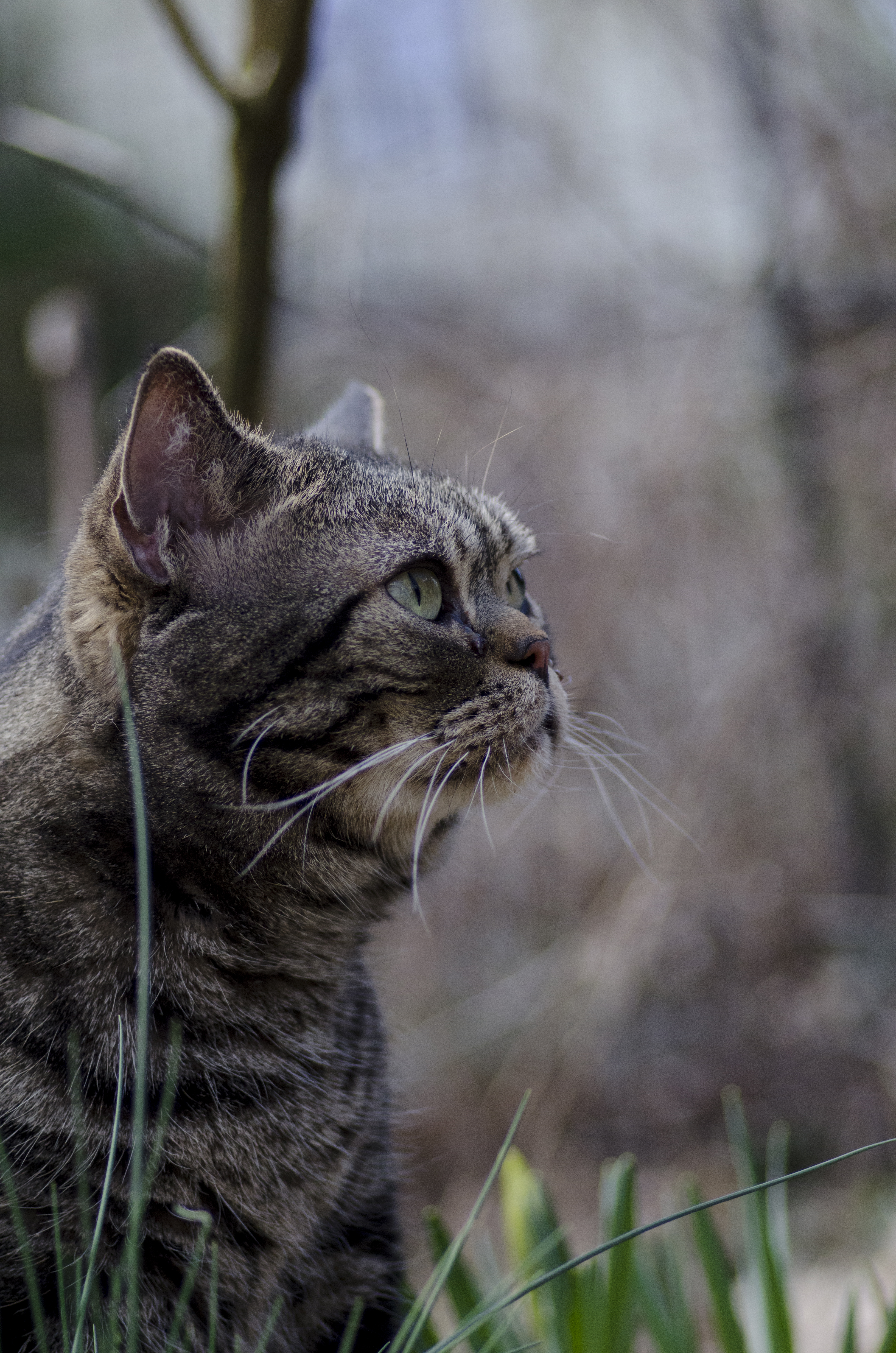 American shorthair brown classic tabby dans un jardin.